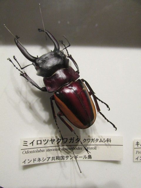 神奈川県立生命の星・地球博物館にあった、スティーブンツヤクワガタの亜種・ミイロツヤクワガタの標本です。